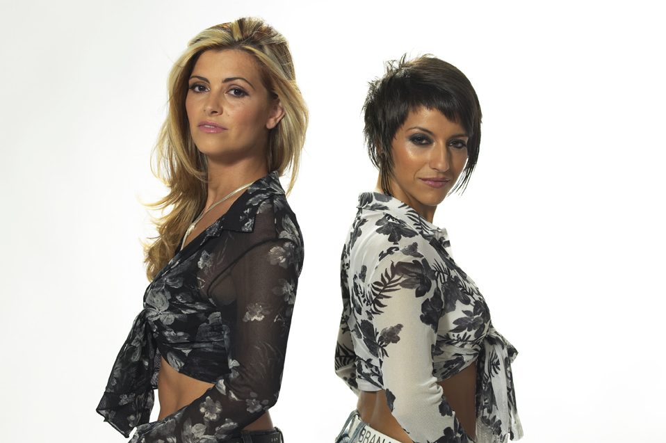 Cantoras